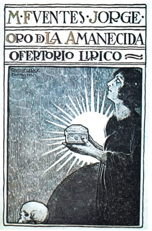 Oro de la amanecida de Manuel Fuentes Jorge, Santiago de Compostela